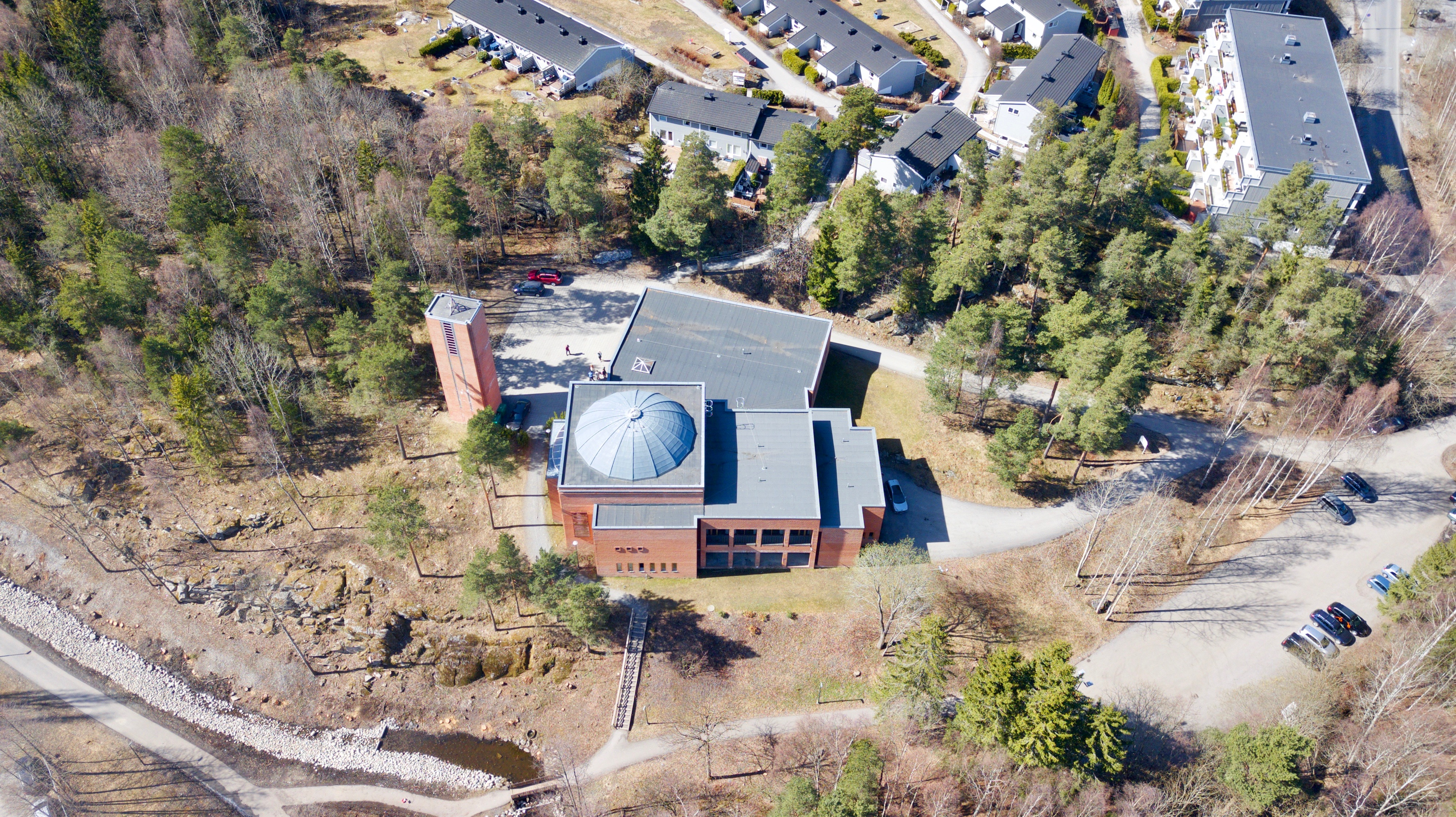 Holmlia kirke i Oslo.